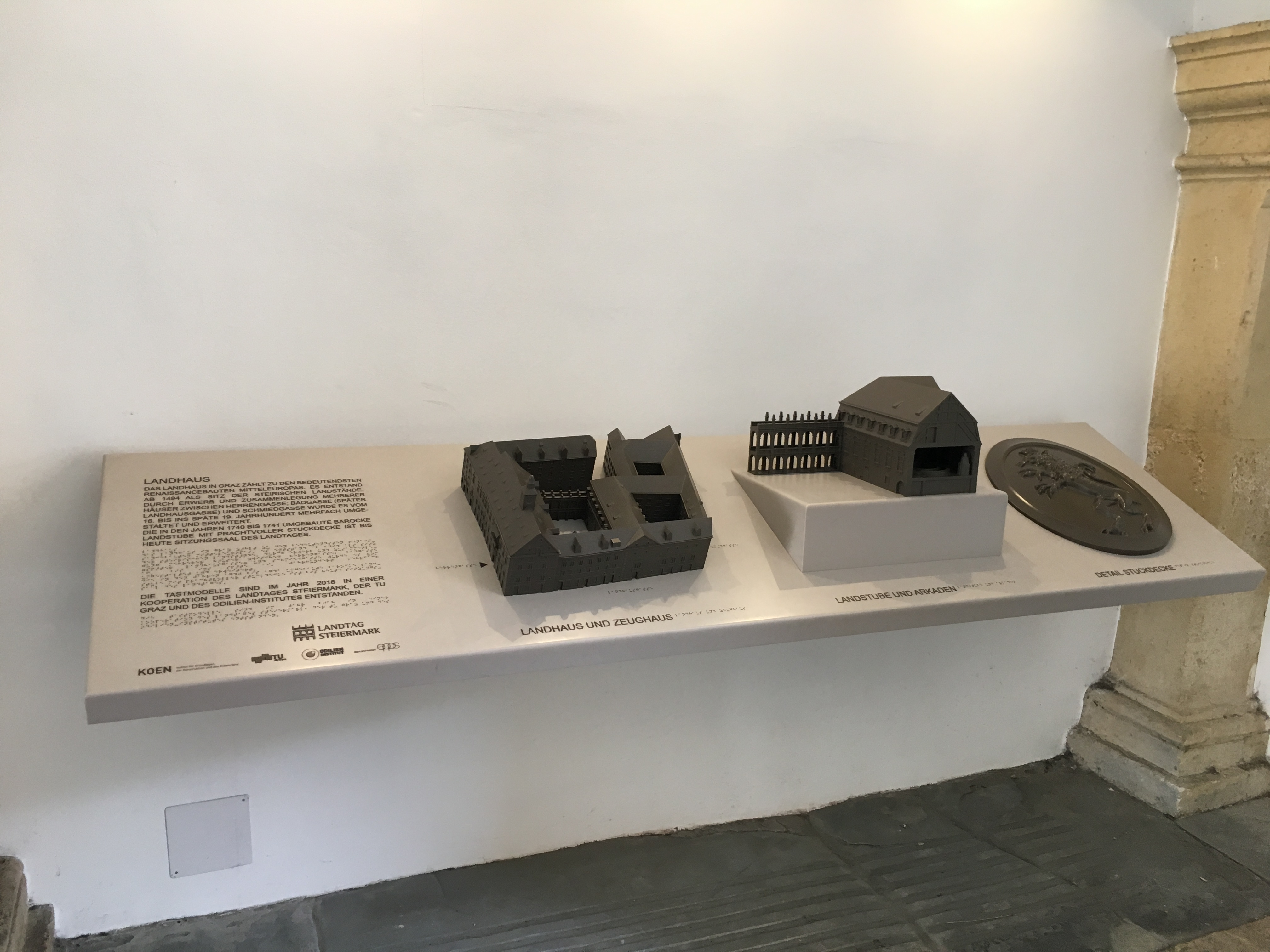 Taktiles Modell des Landhauses für Menschen mit Sehbehinderung.